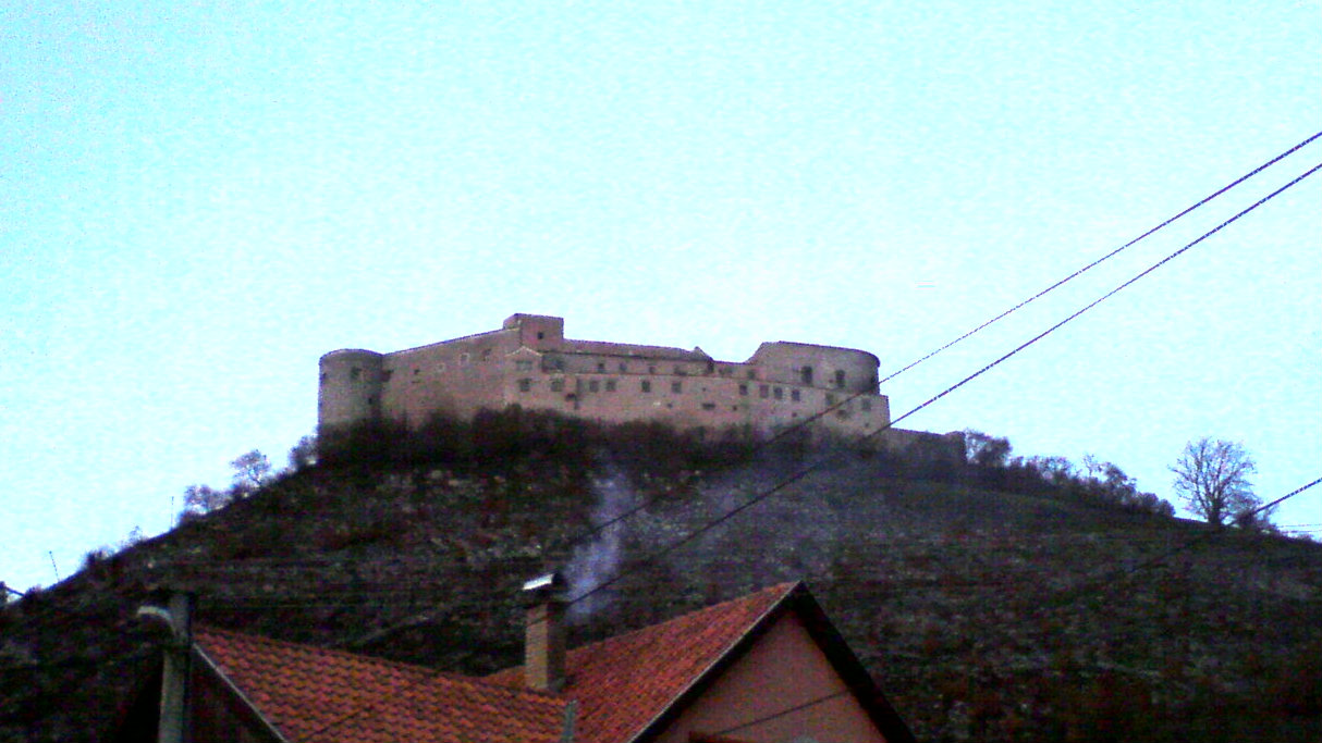 Hrad Krásna Hôrka. Po požiari.